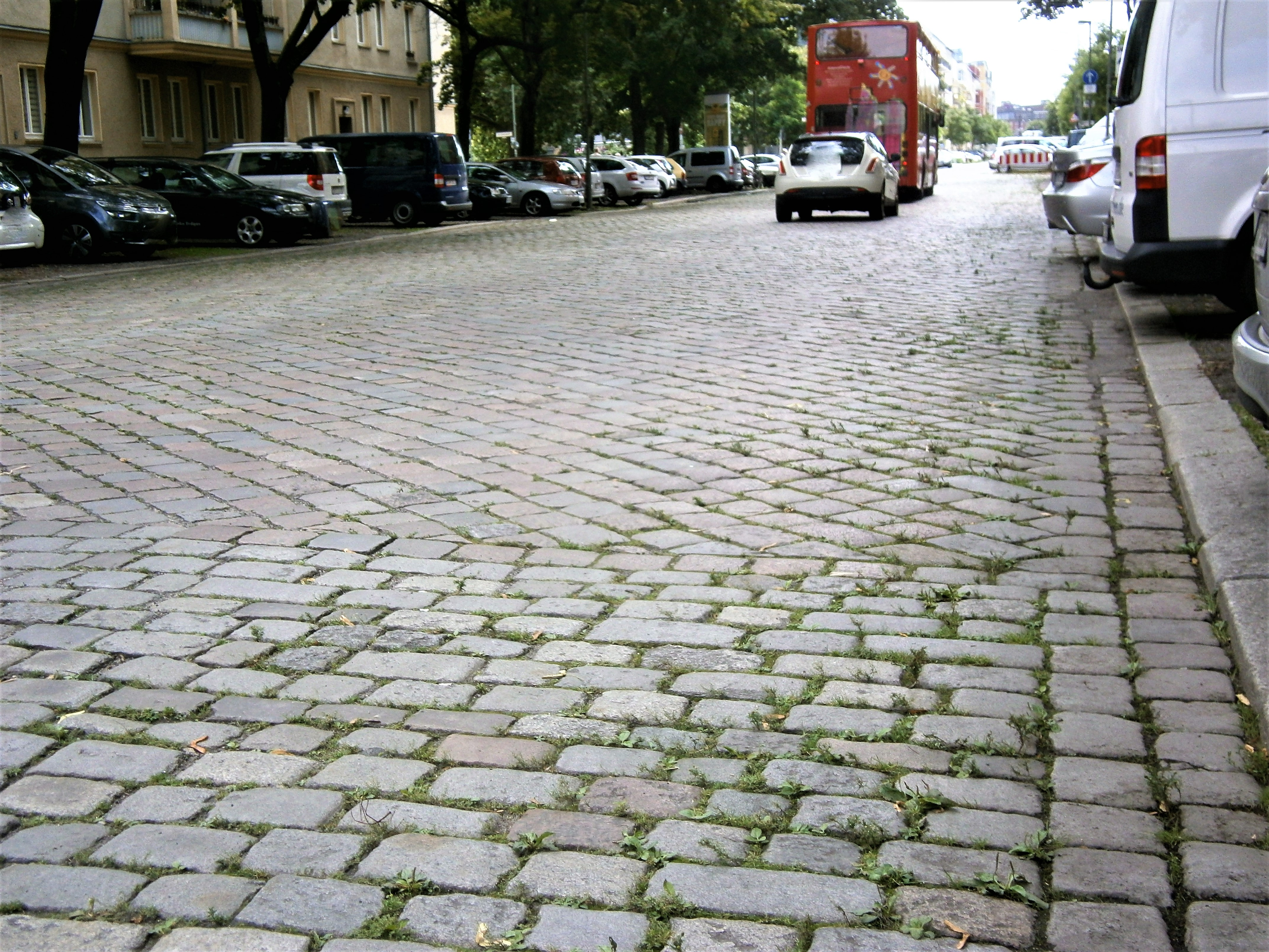 Die Marchlewskistraße ist eine Straße im Berliner Bezirk Friedrichshain-Kreuzberg, Ortsteil Friedrichshain. Angelegt und benannt wurde sie um 1870 auf dem Communicationsweg außerhalb der abgerissenen Berliner Zollmauer unter dem Namen Memeler Straße. Im Jahre 1950 erfolgte die Umbenennung in Marchlewskistraße. Schwere Schäden an der Bebauung bei Luftangriffen im Zweiten Weltkrieg brachten beim Neuaufbau Änderungen, jedoch der Straßenlauf blieb erhalten Das Bild zeigt im Einzelnen:Straßenbelag von der Wedekindstraße nach Süden